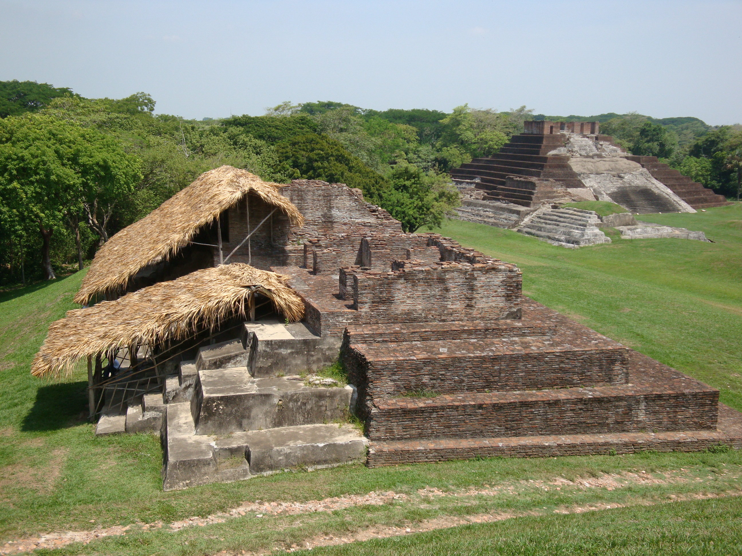 Templos VI o "Templo del Mascarón" y Templo VII o "Templo de las Figuras Sedentes", en la ciudad maya de Comalcalco, Tabasco, México.